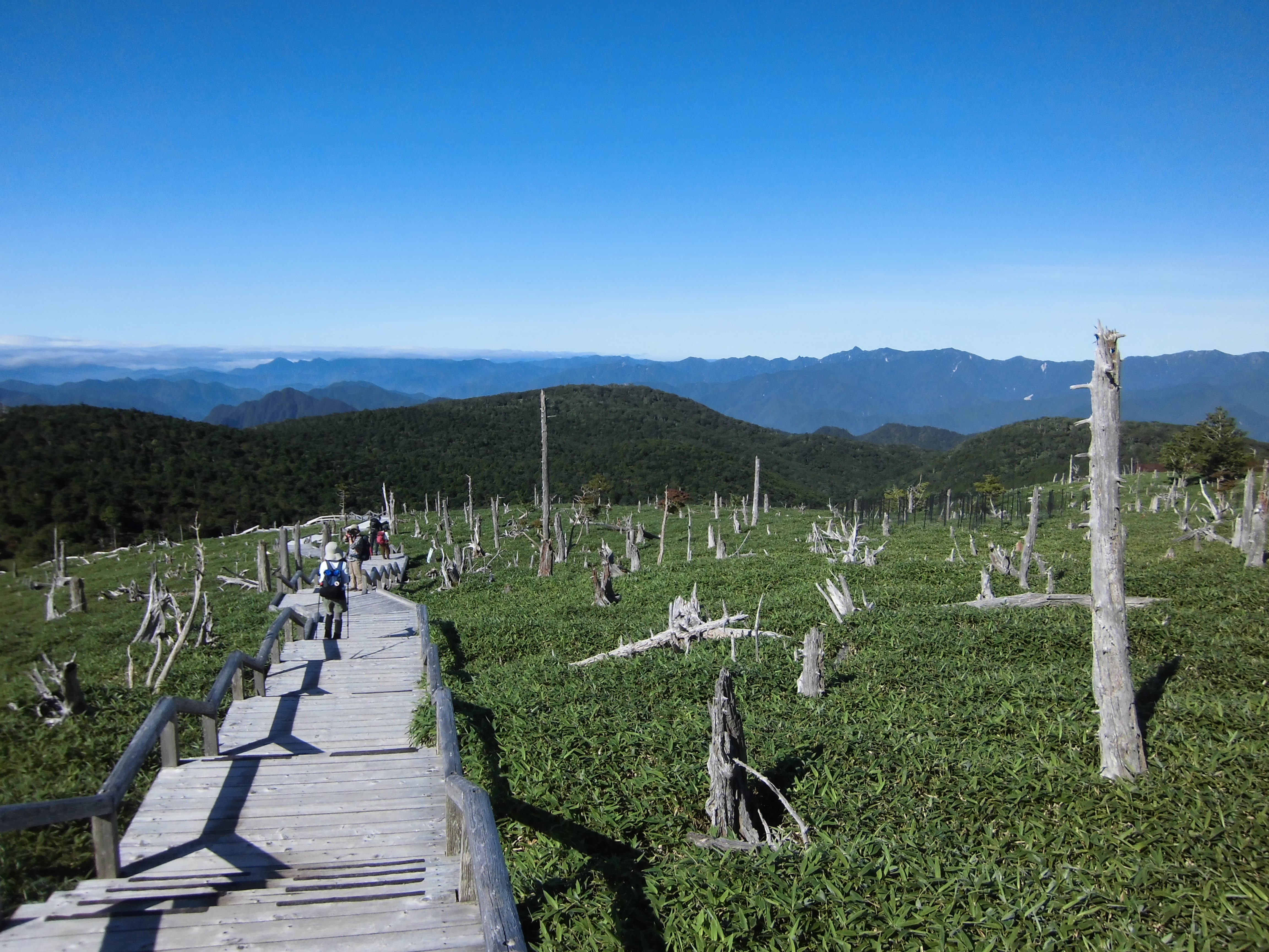 原生林の倒木